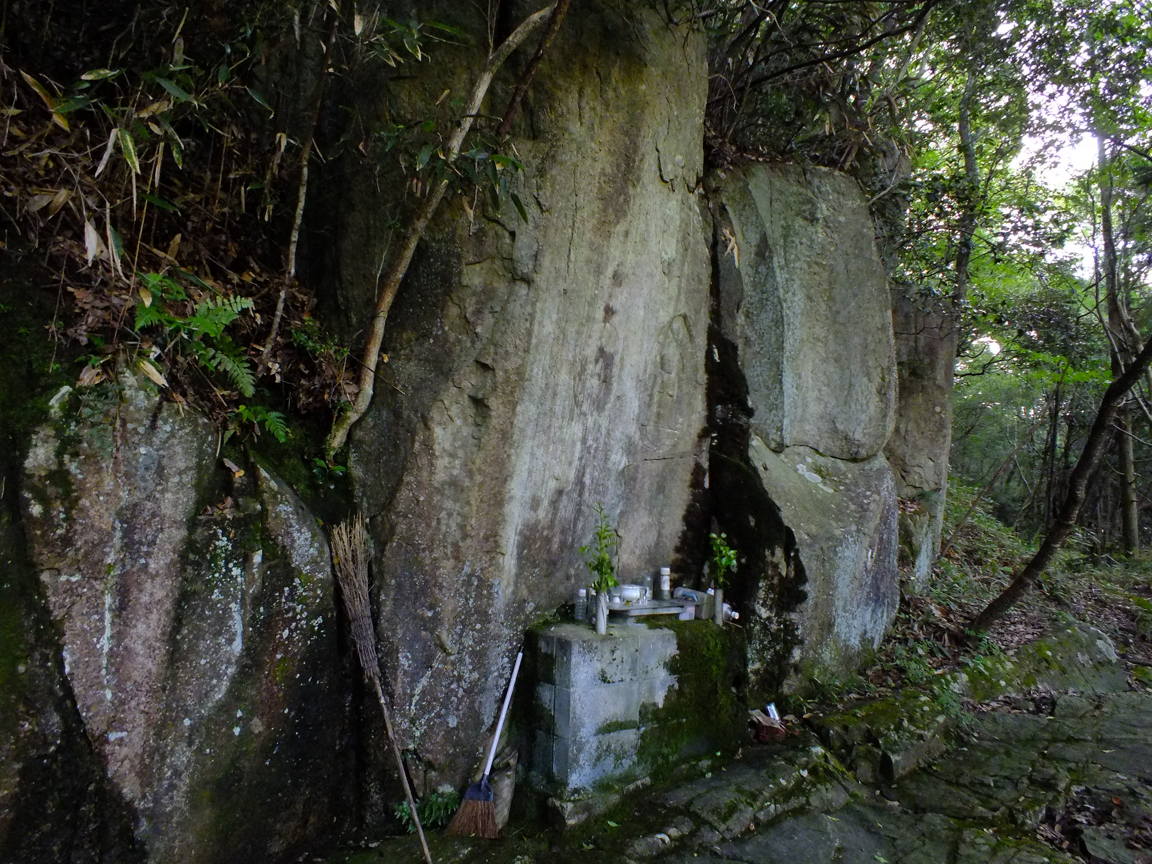 2015-09-14 Seto-Jizo Konda-cho,Sasayama,Hyogo,Japan 瀬戸地蔵